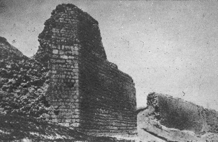 Castillo - Tordehumos (Valladolid) - España Turística y Monumental / Cuarto álbum / Las Bellezas de Castilla / Región Leonesa - Cromo 70 x 50 Sepia